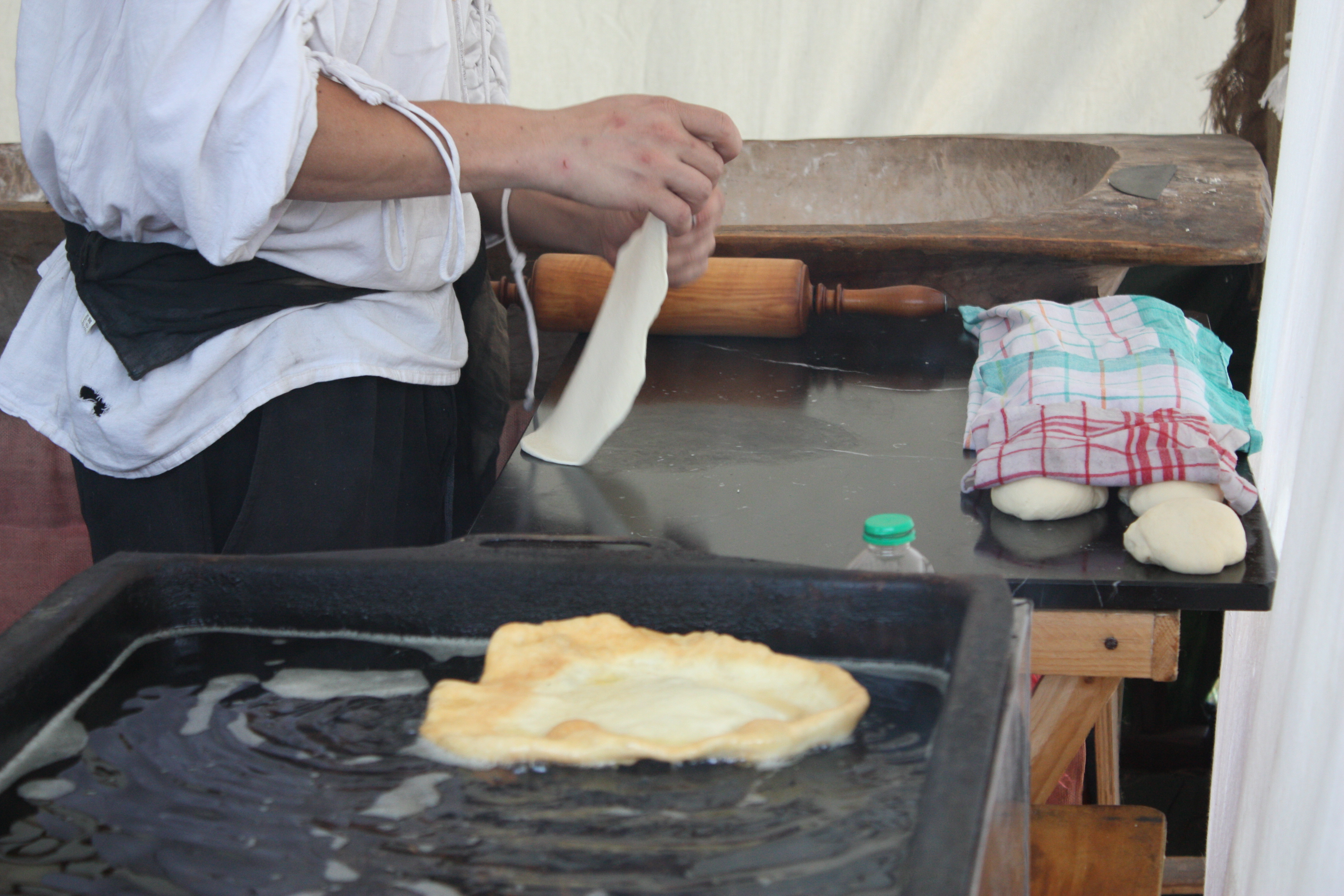 Langos